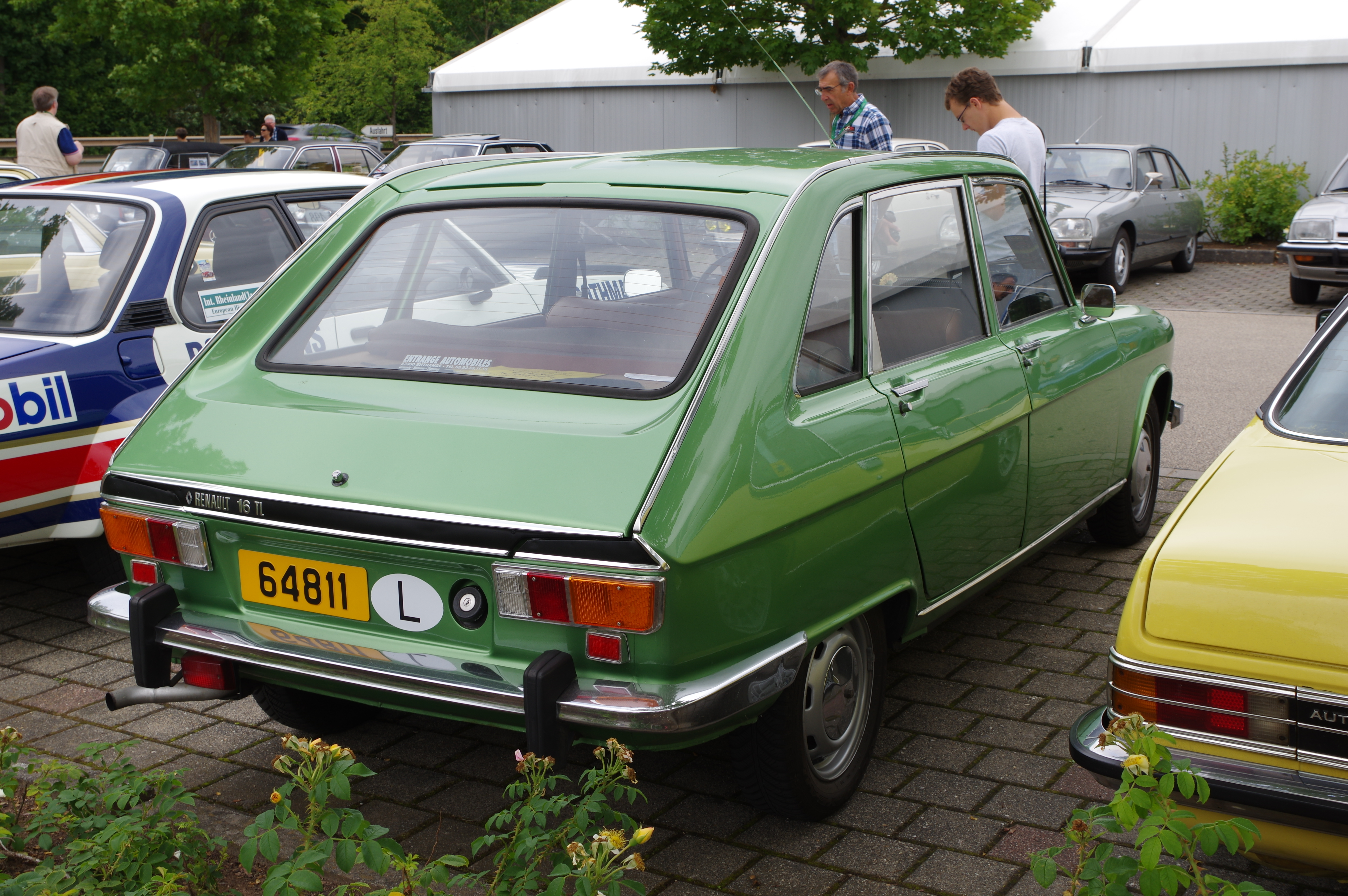 Renault 16 TL, 1977